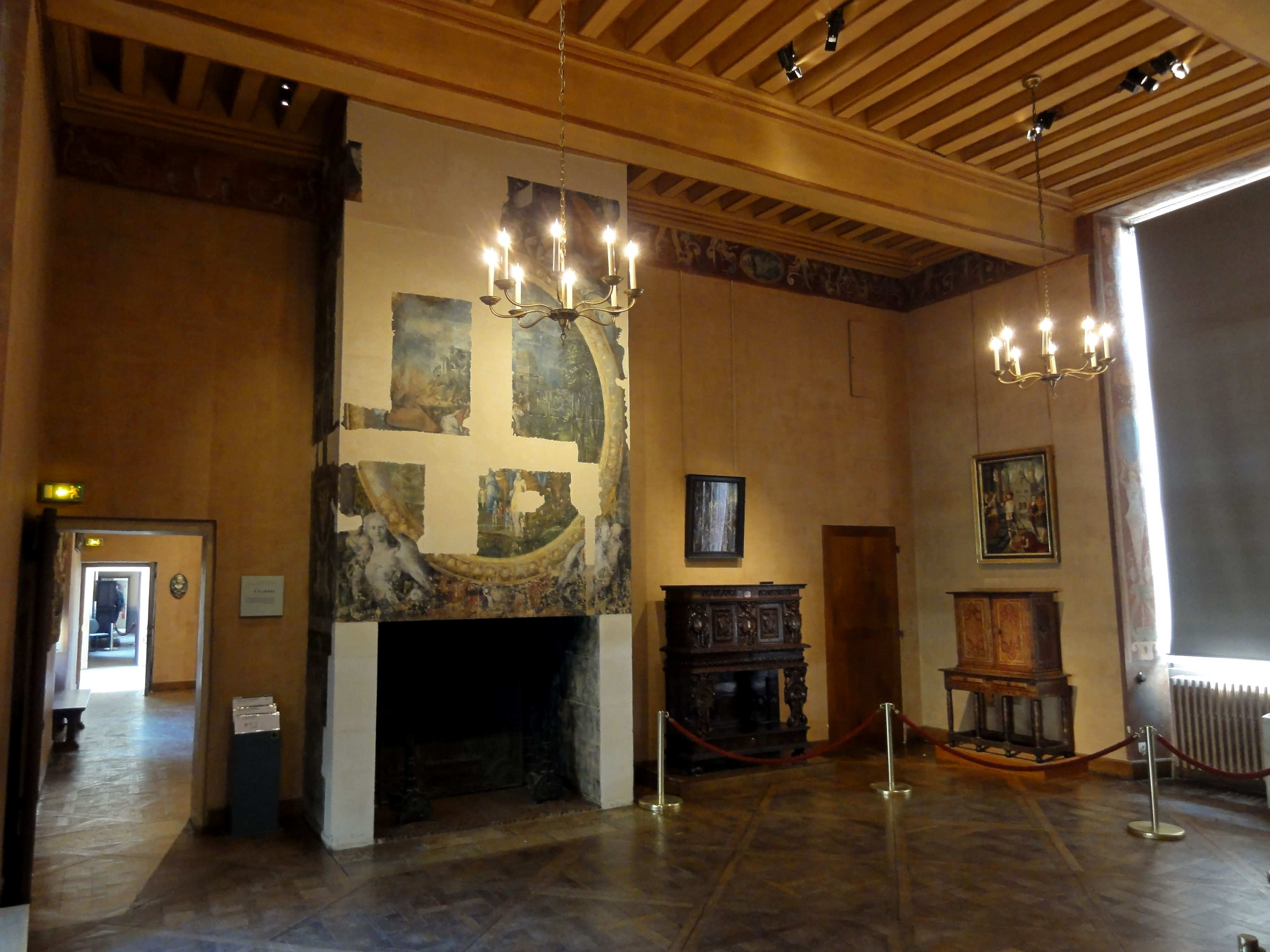 Chambre de Madeleine de Savoie.